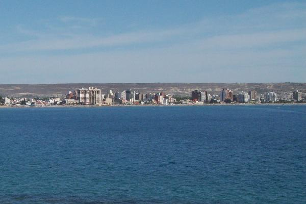 Puerto Madryn visto desde la costa sudeste.